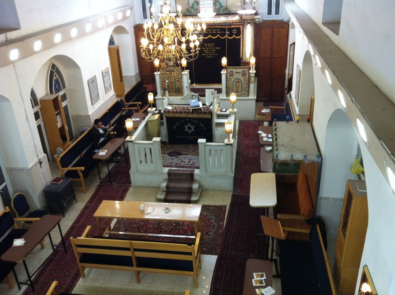 בית הכנסת של אנוסי משהד בשכונת הבוכרים בירושלים.